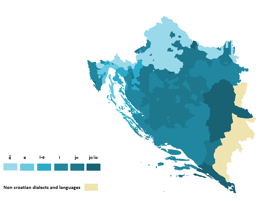 Refleks jata u hrvatskom jeziku.